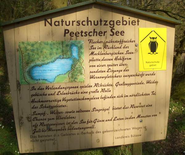 Informationstafel zum Naturschutzgebiet Großer Peetscher See in Mecklenburg-Vorpommern.